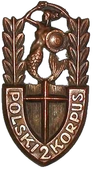 Odznaka 2 Korpusu Polskiego PSZ